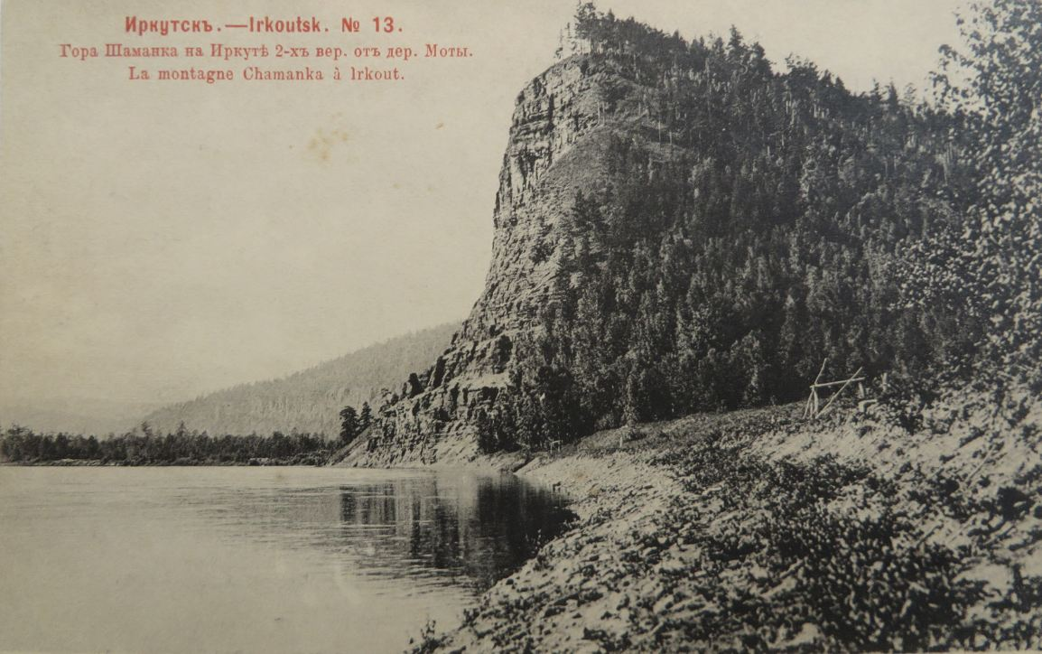 Старинная открытка с изображением горы Шаманки